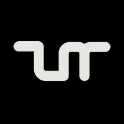 transmediale logo old